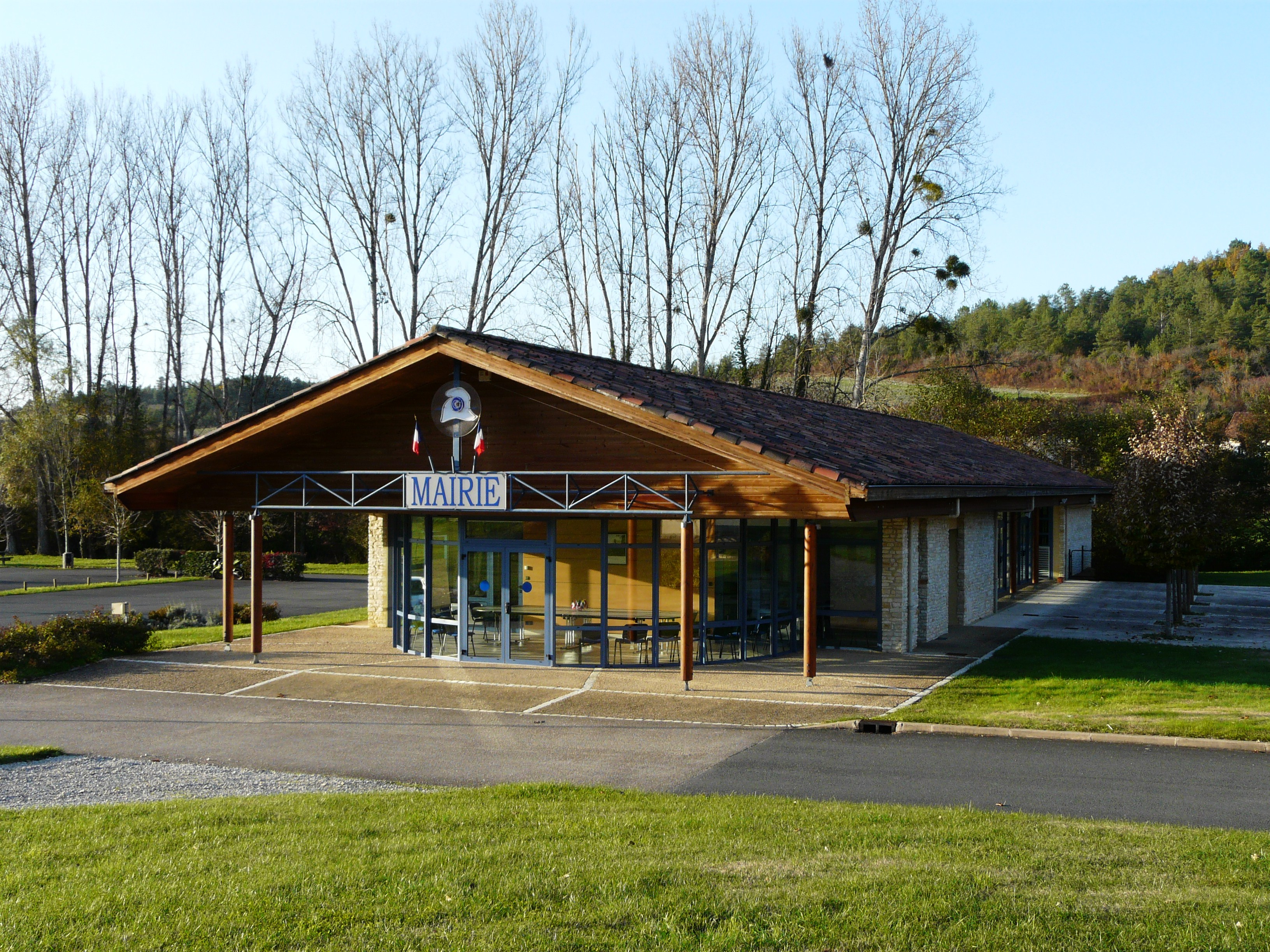 La mairie de Saint-Crépin-d'Auberoche, Dordogne, France.